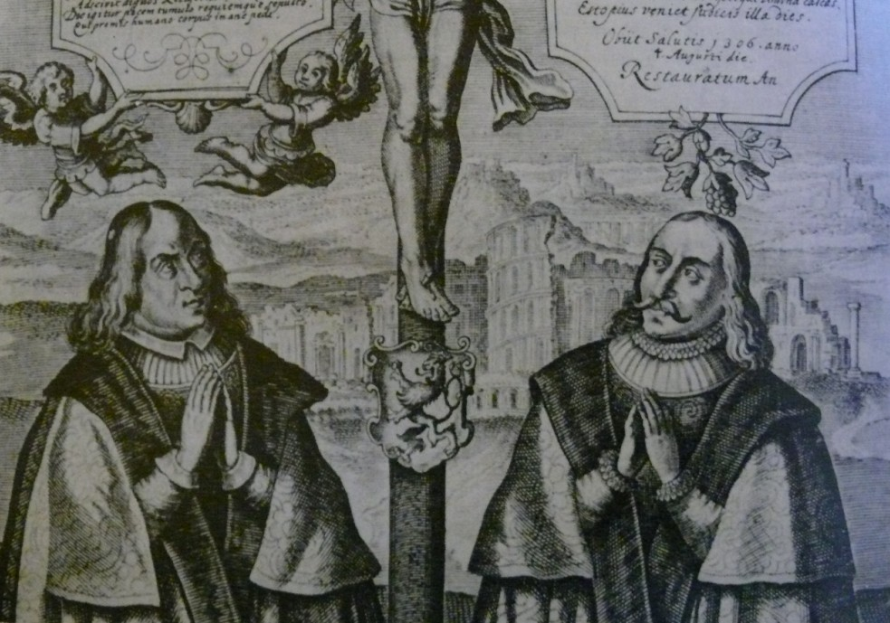 Epitaf - Václav III. a Václav II. s ruinami Zbraslavského kláštera v pozadí - rytina ze 17. století